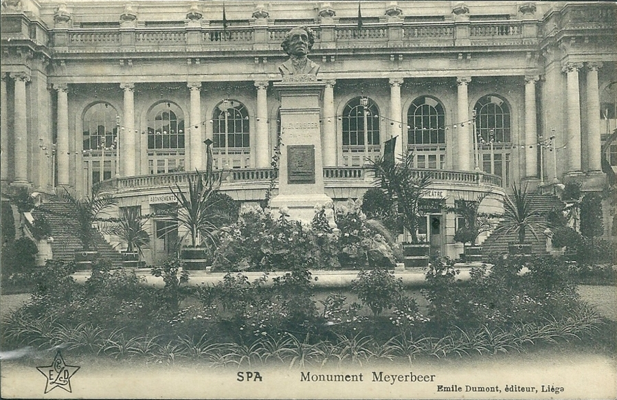 Monument à Giacomo Meyerbeer par l'architecte-sculpteur Charles Girard. (Offert par le bourgmestre Baron Joseph Crawhez à la ville de Spa) première implantation dans la cour du casino.